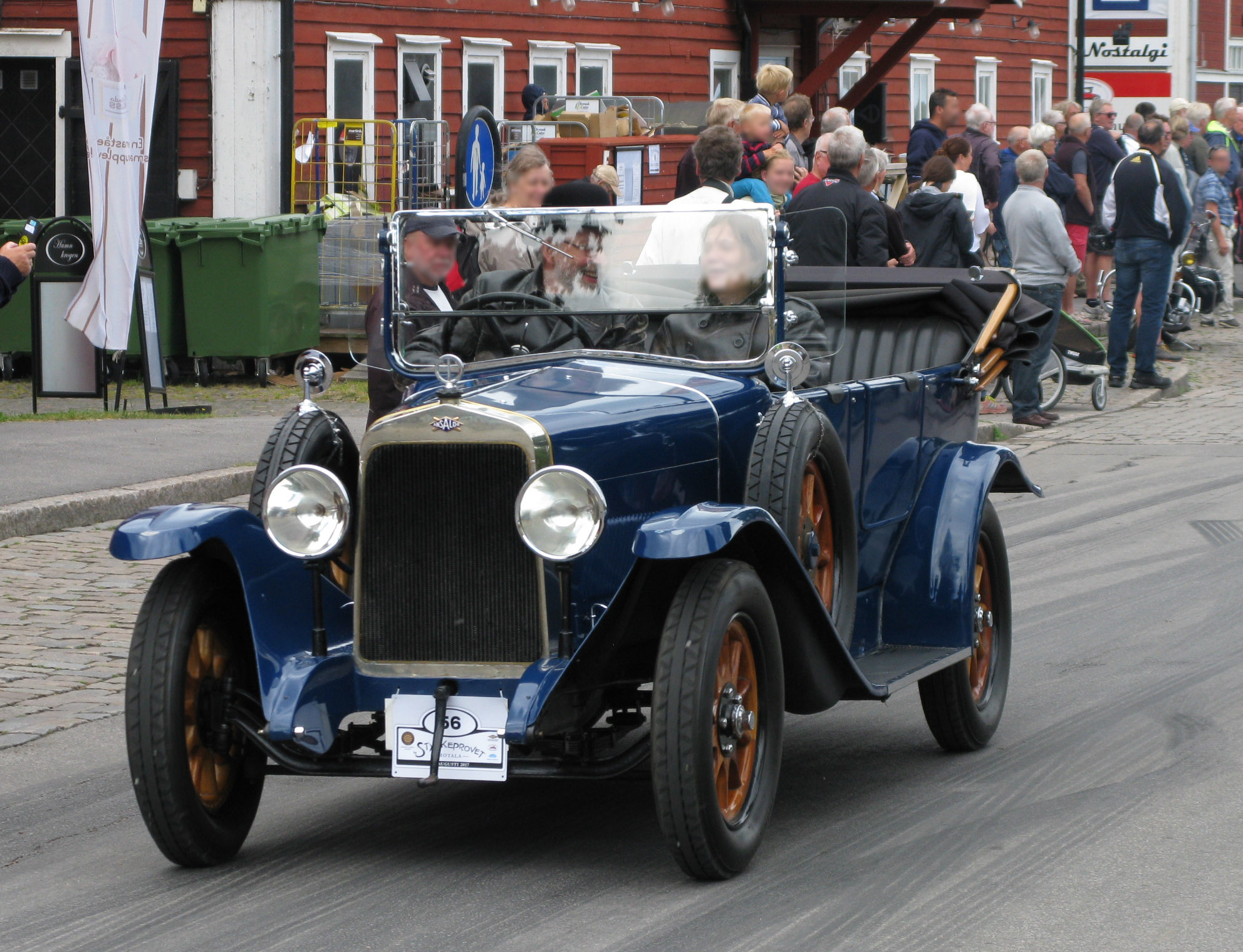 Ansaldo 4c 1922